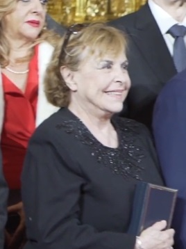 El Palacio de La Merced en Córdoba acogió ayer la ceremonia de entrega de las Medallas de Oro al Mérito en las Bellas Artes 2017 a más de una veintena de personalidades, con las que el Ministerio de Cultura y Deporte ha distinguido a personas y entidades que hayan destacado en el campo de la creación artística y cultural o hayan prestado notorios servicios en el fomento, desarrollo o difusión del arte y la cultura o en la conservación del patrimonio artístico.